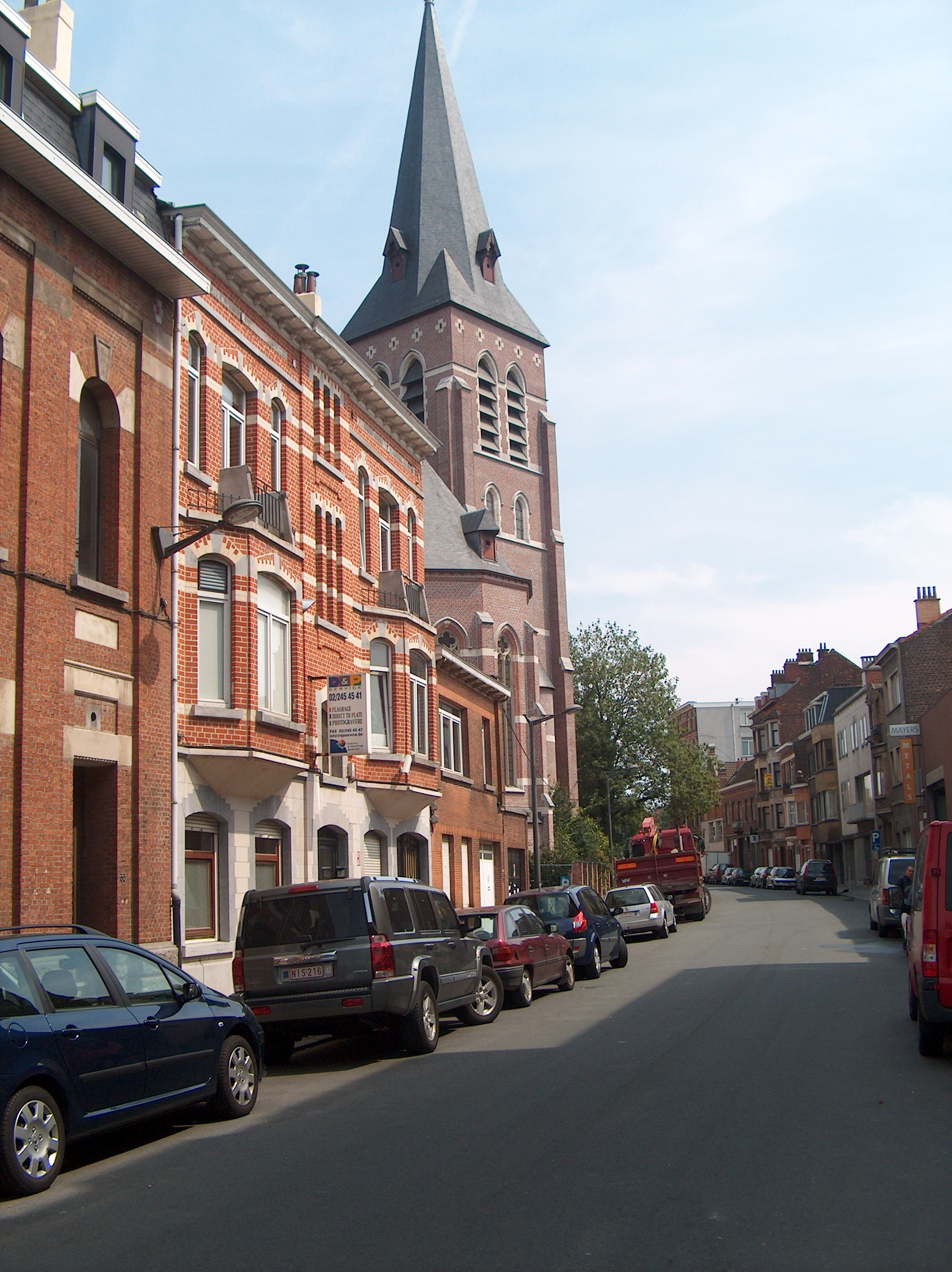 La rue d'Anethan à Schaerbeek, Bruxelles, Belgique.